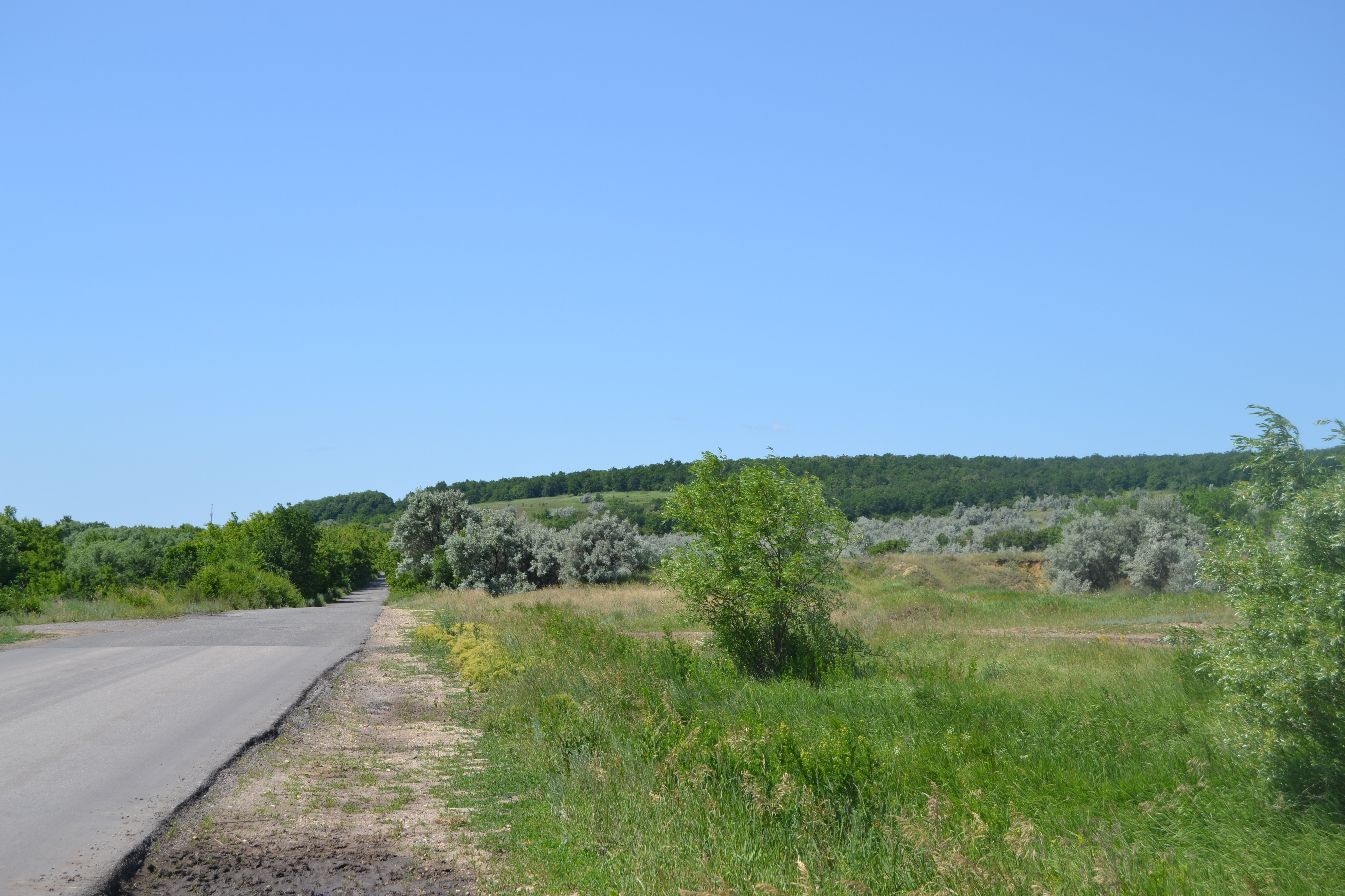 Изображение населённого пункта. Окрестности Козлаковки (Саратовский район)